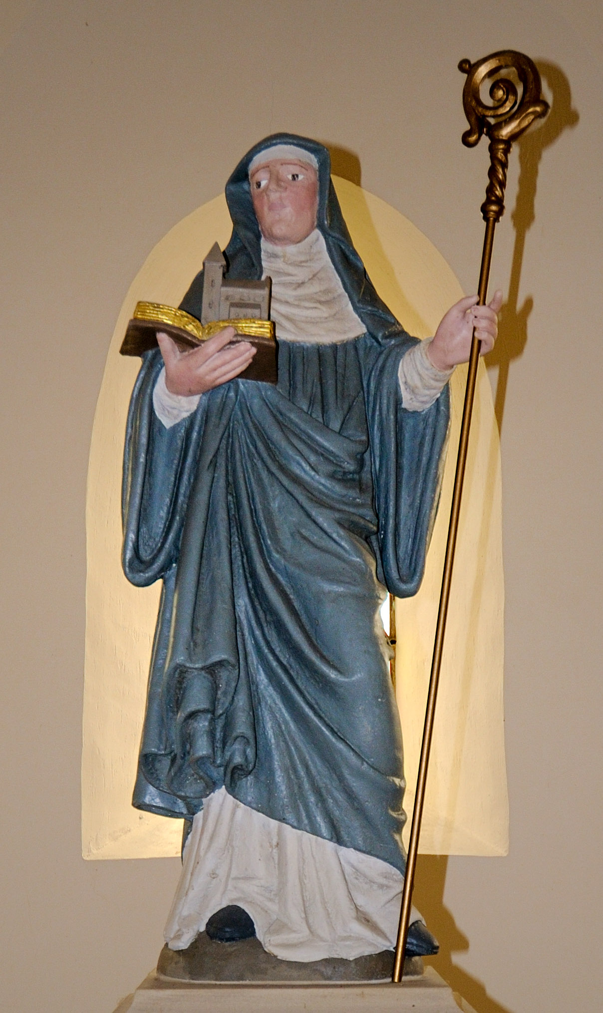 Sujet : Irmina-Statu zu Iechternach Source : Eege Foto :lb :User : Cornischong Lizenz : GFDL